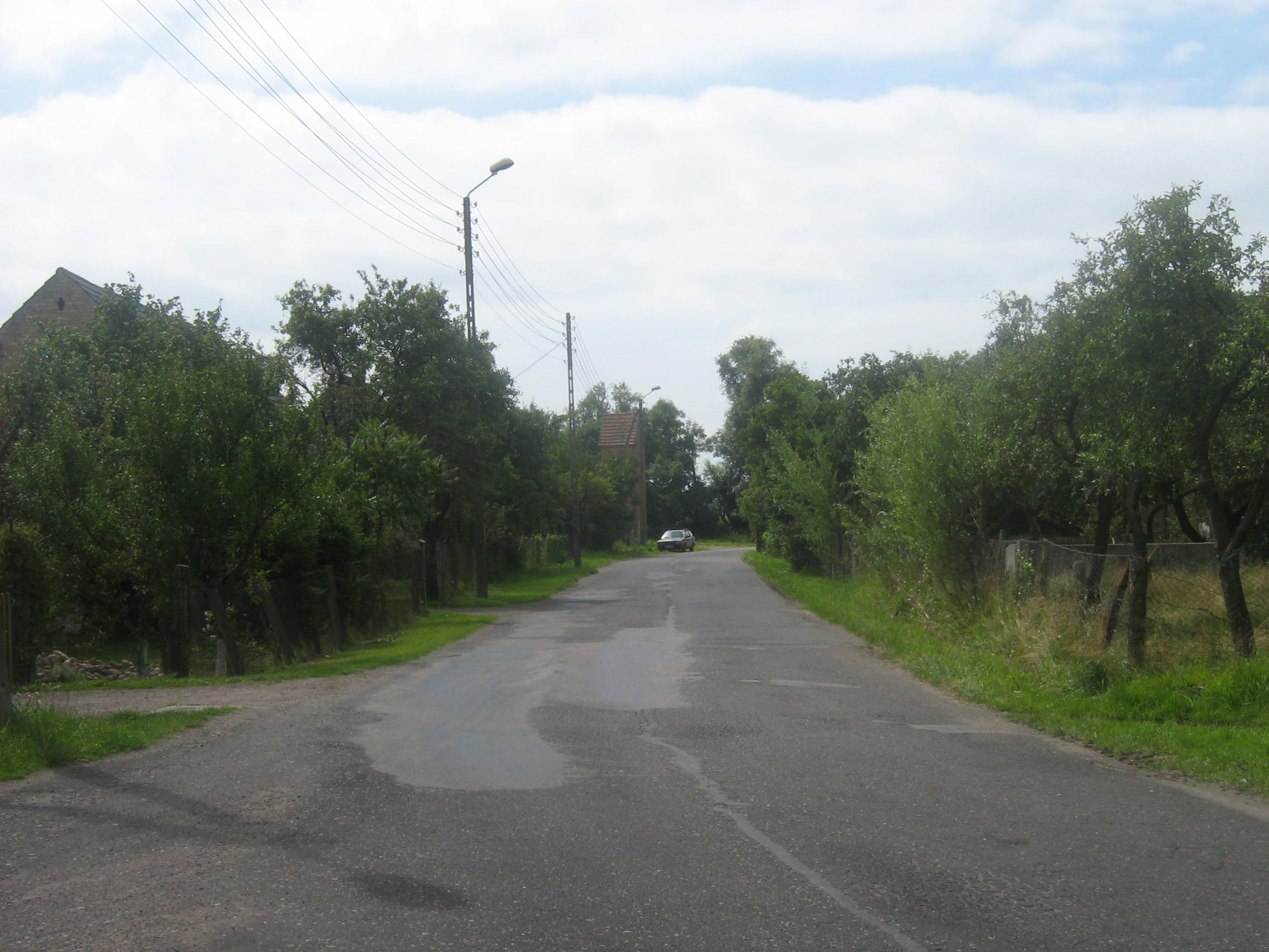 Laska (województwo zachodniopomorskie)